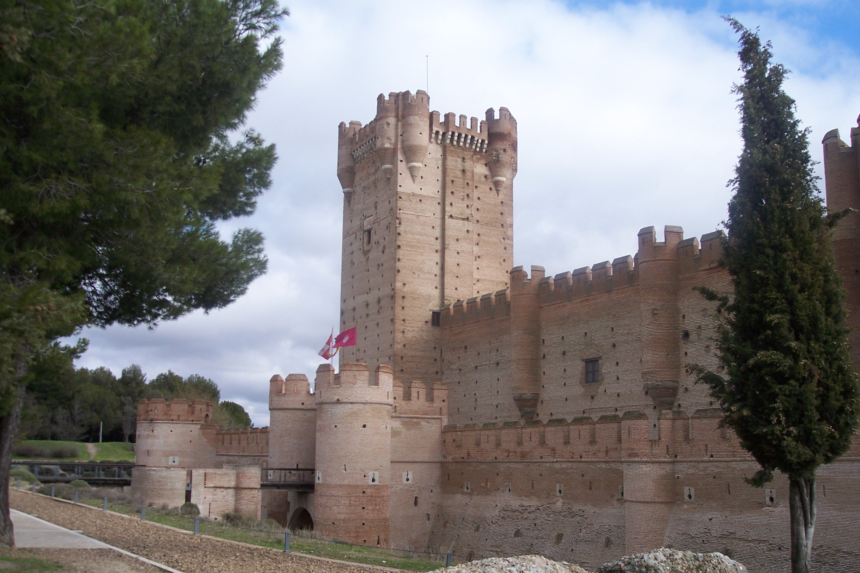 Castillo de La Mota en Medina del Campo, Valladolid (España).